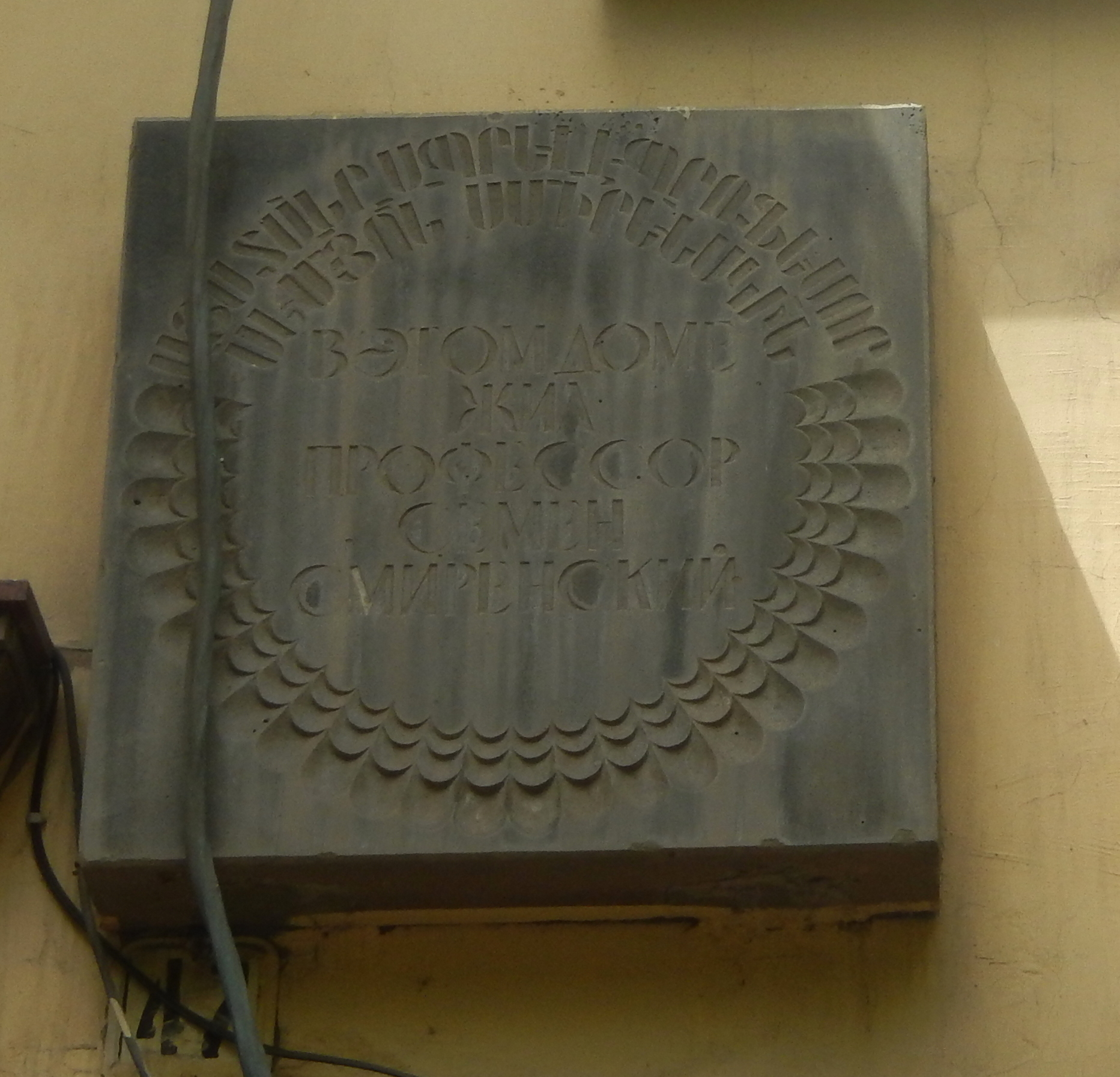 Semyon Smireski's plaque